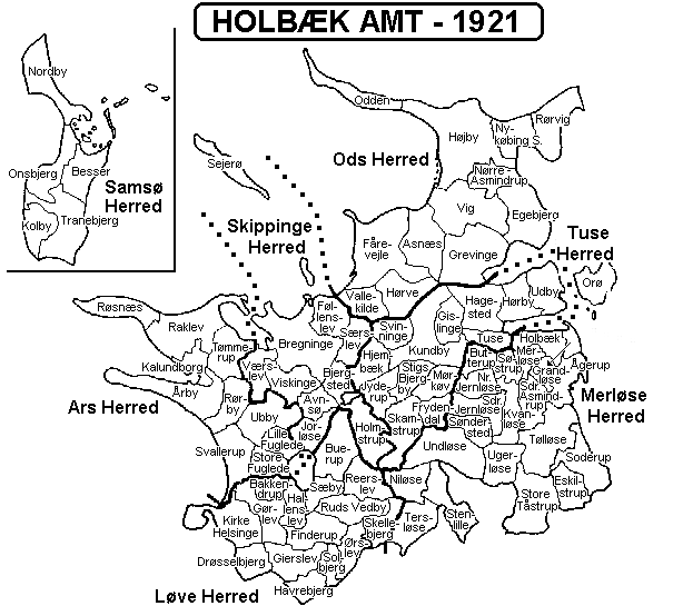 Holbæk Amt Denmark. Map by Svend-Erik Christiansen. NB, iflg. Orøs hjemmeside var Orø endnu ikke en del af amtet i 1921.